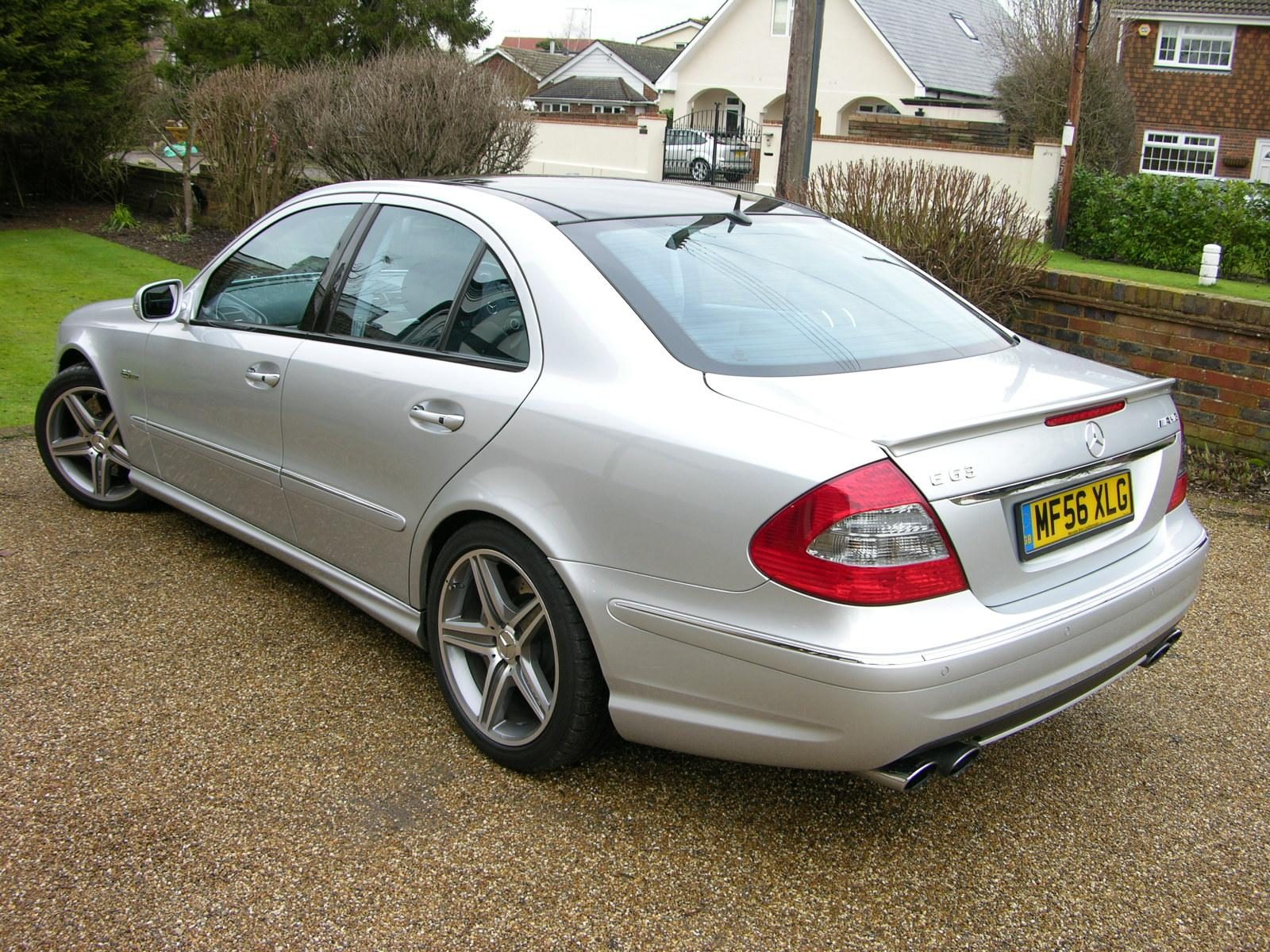 2006 Mercedes Benz E63 AMG